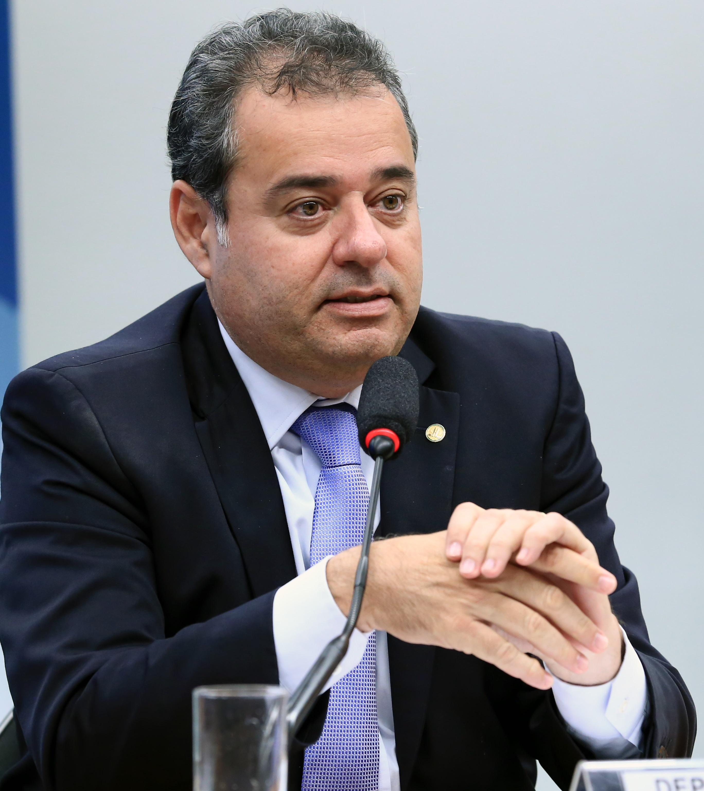 Danilo Cabral em outubro de 2017.